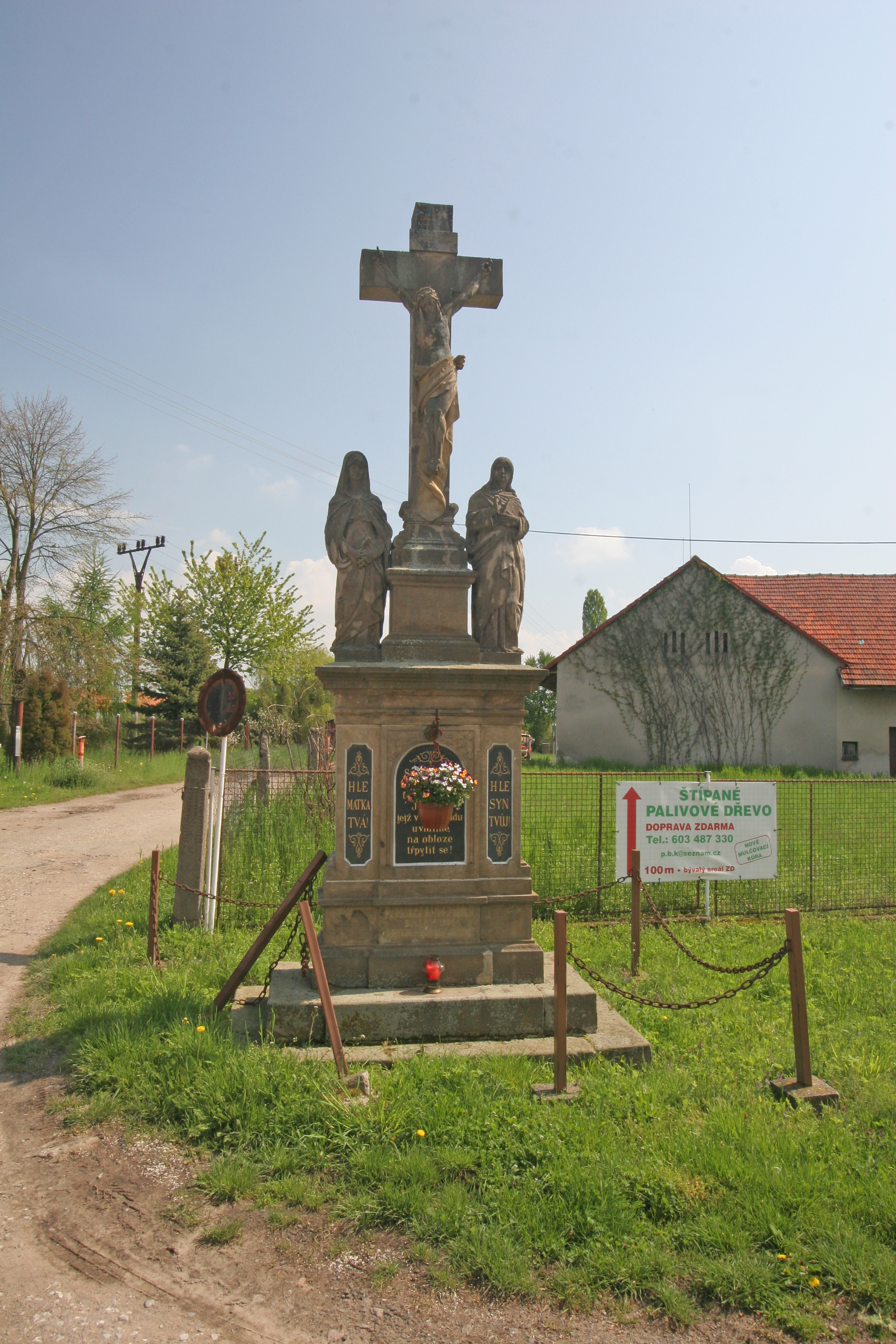 Kladina křížek